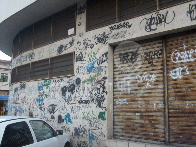 Fotos relacionadas a "pichação", a ser adicionada na página de mesmo nome, contendo informações sobre a situação atual desse assunto.